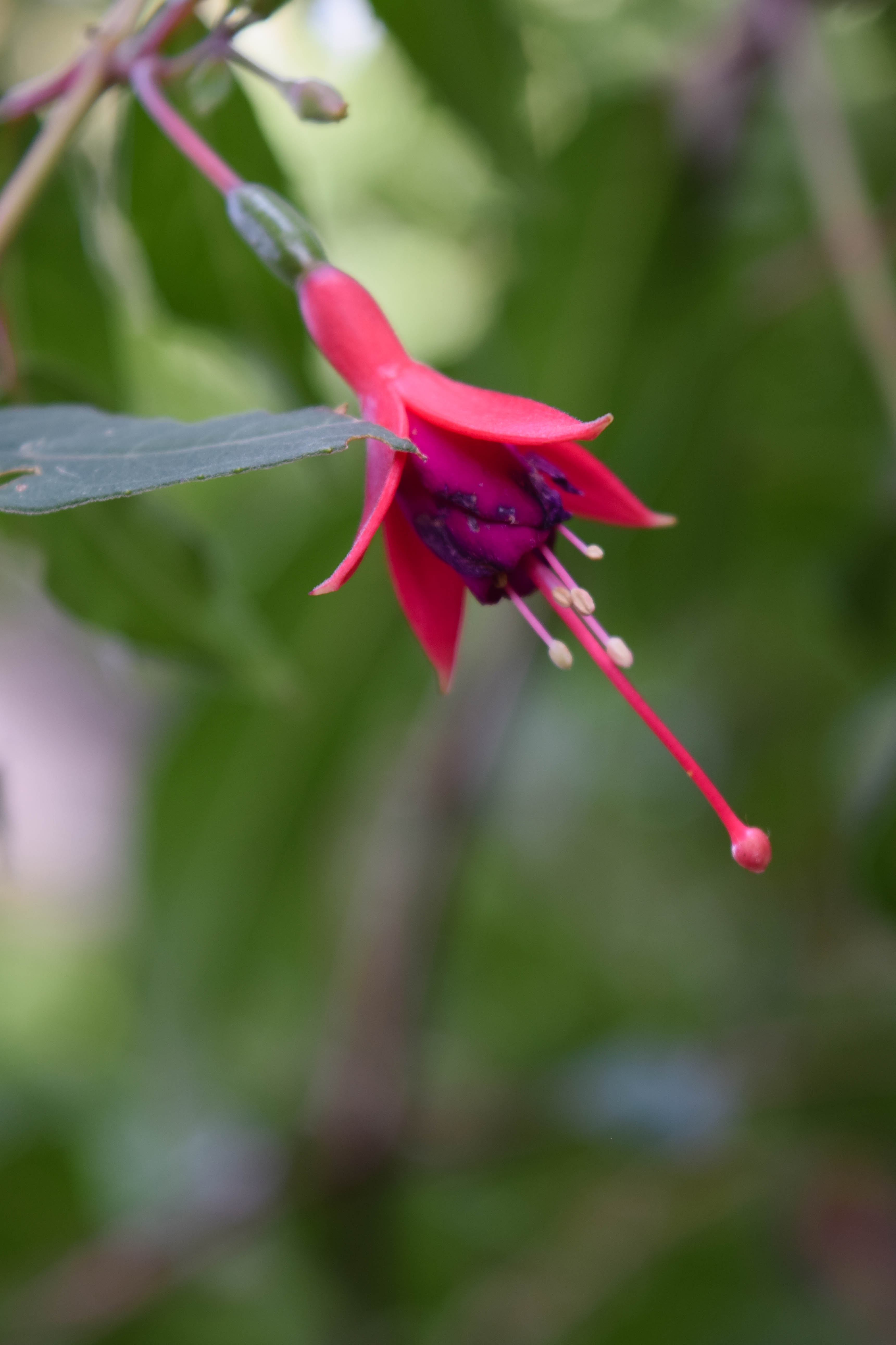 Nombre científico o latino: Fuchsia Familia: Onagráceas Arbusto de crecimiento erecto o colgante, con hojas elípticas y dentadas situadas en pares opuestos. Las flores son péndulas y en forma de campana, estando normalmente los pétalos y los sépalos coloreados en distintos tonos (rojos, rosas, anaranjados, amarillos o blancos).